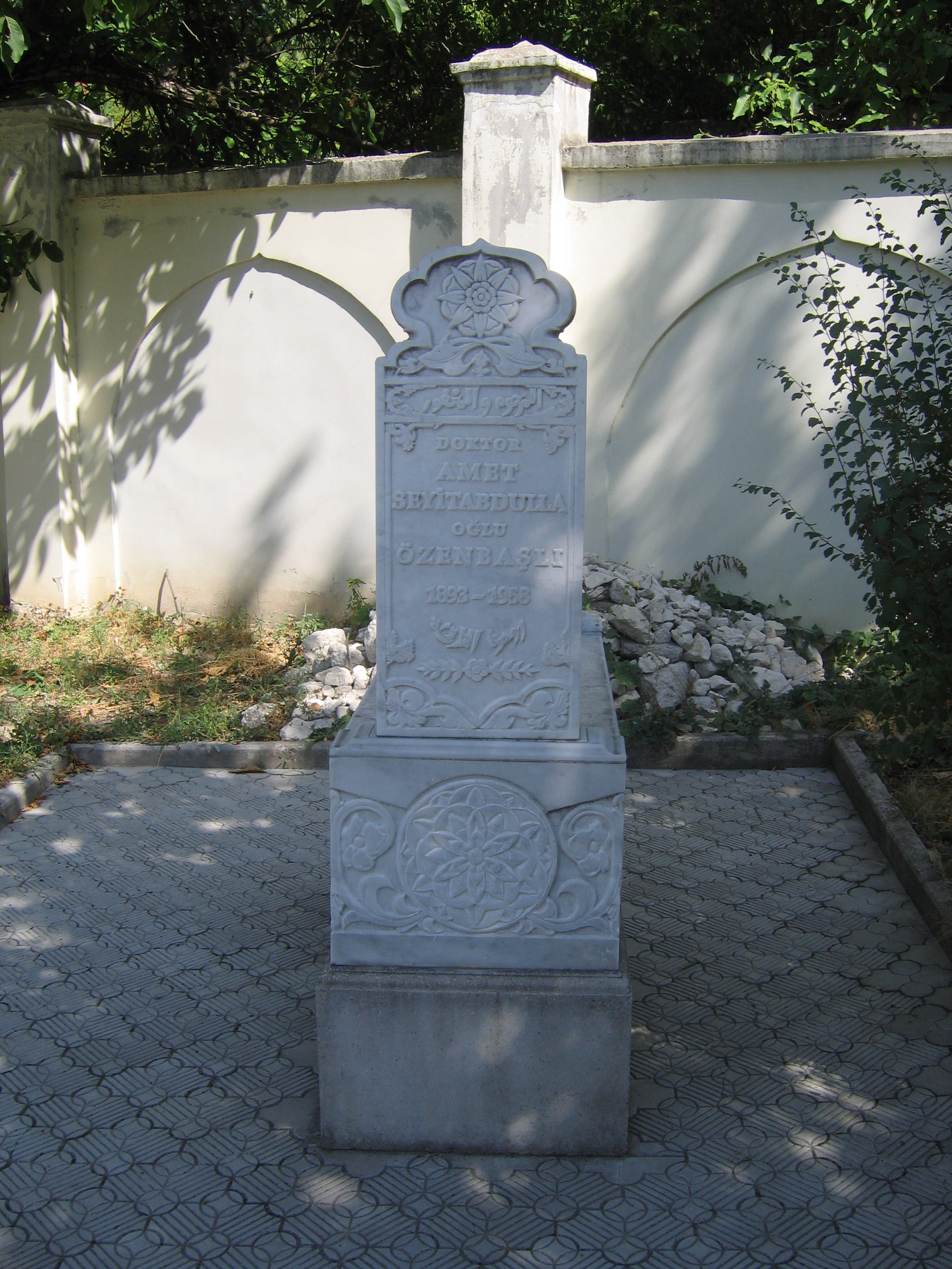 Amet Özenbaşlı tomb, Bakhchisaray, Crimea